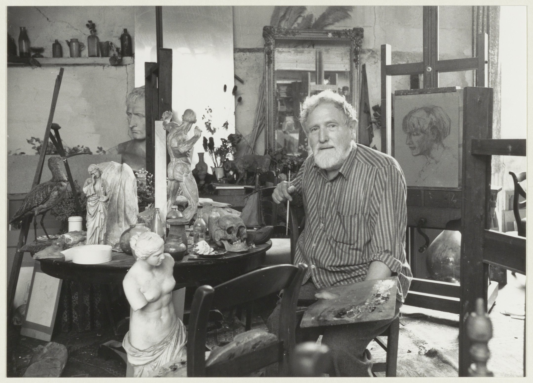 CollectieCollectie Fotoburo de BoerInventarisnummerNL-HlmNHA_54023741NL-HlmNHA_1478_4145ABeschrijvingPoppe Damave in zijn atelier aan het Donkere Spaarne 54 rdFotonummerNL-HlmNHA_1478_2408DocumenttypePortrettenVervaardigerBoer, Poppe de Soort vervaardigerFotograaf AnnotatiesHD 200888PersonenDamave, Poppe Functies personenkunstenaar LandNederland ProvincieNoord-Holland GemeenteHaarlem PlaatsHaarlem StraatDonkere Spaarne Begindatum1987Einddatum1987TechniekFoto Trefwoordenkunst en cultuur